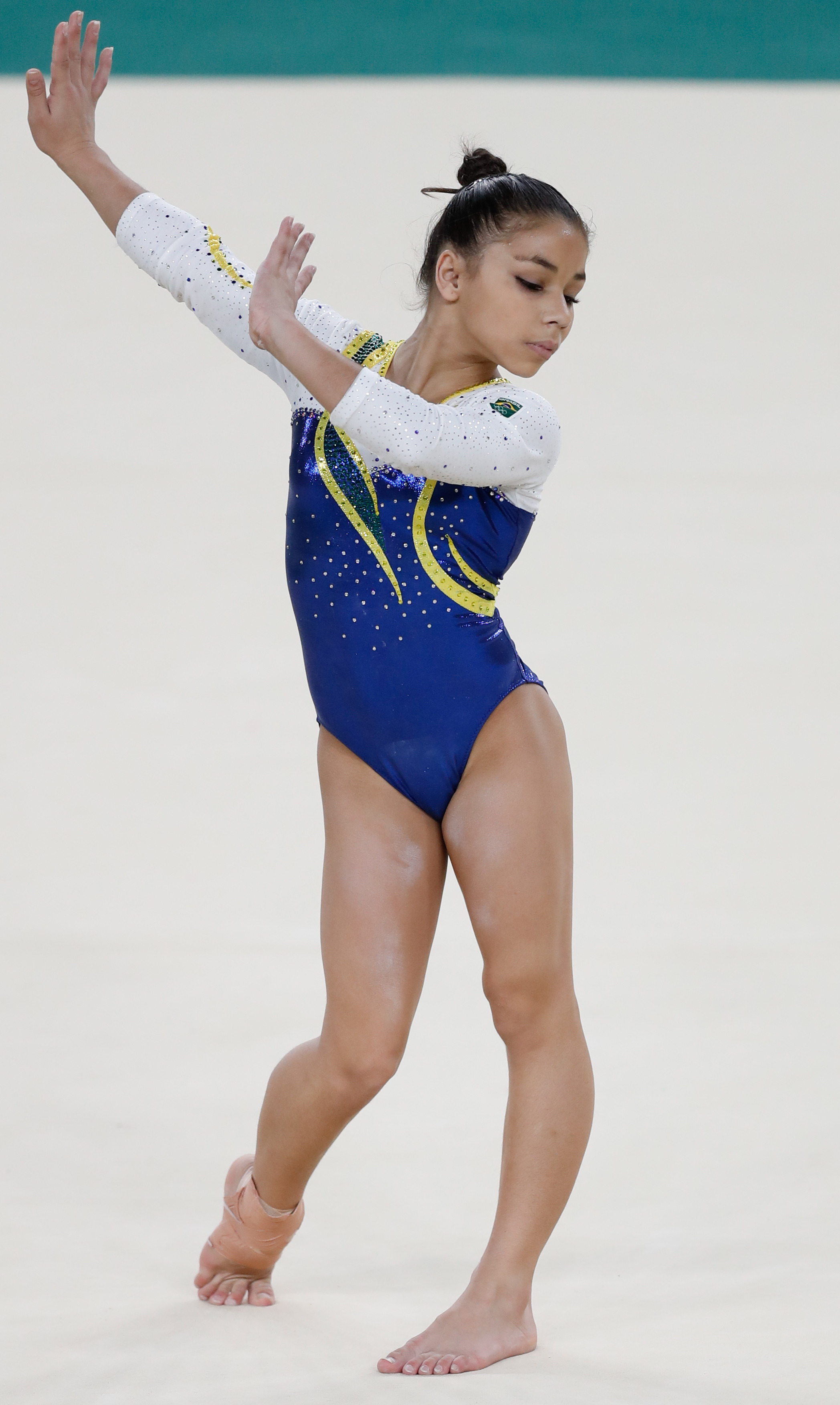 Rio de Janeiro - Flávia Saraiva durante treino da seleção feminina de ginástica artística do Brasil na Arena Olímpica dos Jogos Rio 2016 (Fernando Frazão/Agência Brasil)